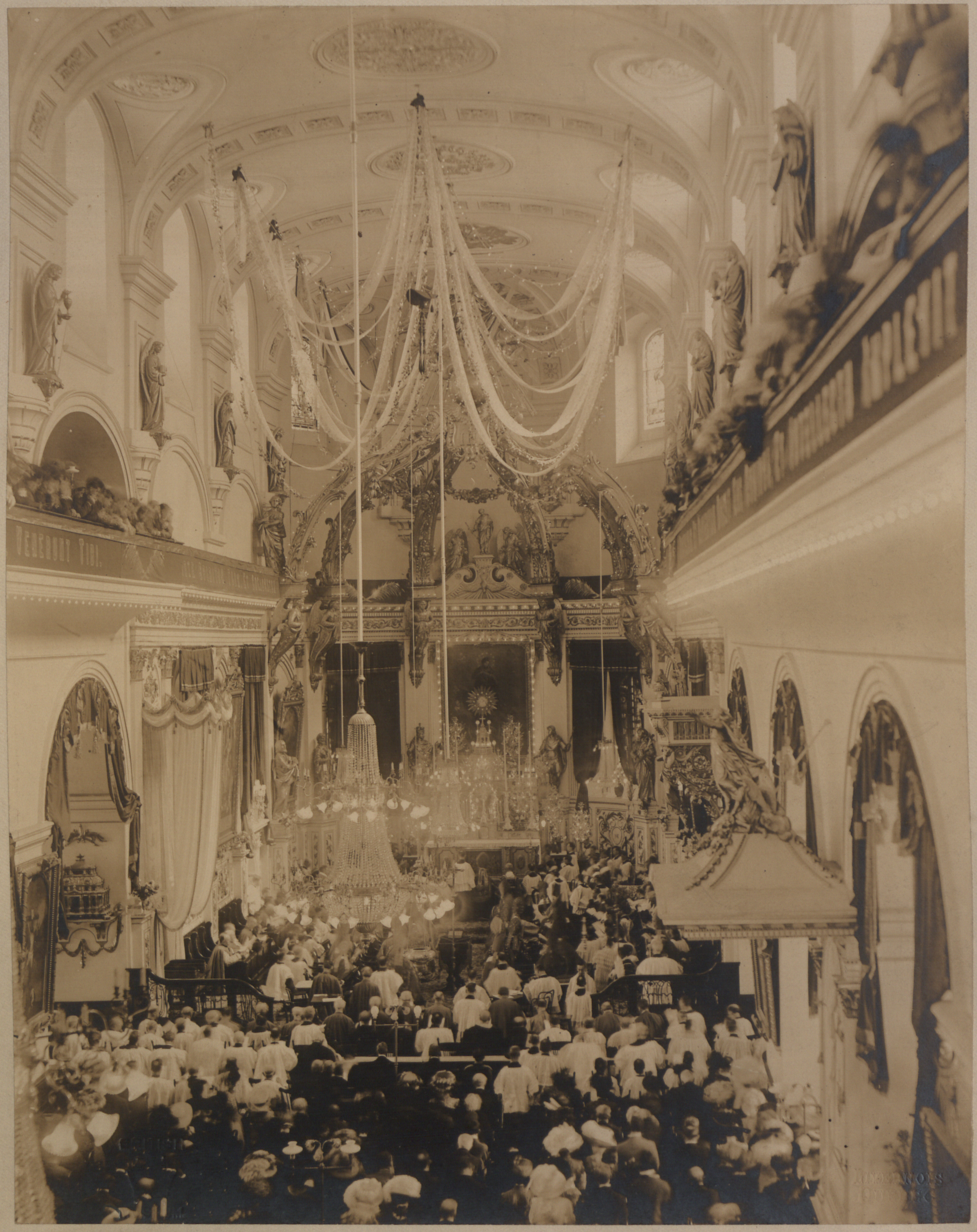 L'interieur de la Basilique de Notre Dame de Quebec a l'occasion de l'ouverture du ler Concile Plenier de Canada. Photo A.